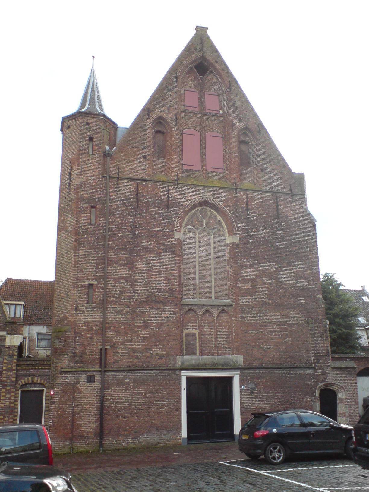 Voorgevel van de Waalse kerk te Zwolle